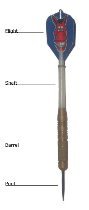 Description Afbeelding van een dartpijl met bijbehorende informatie. DateDonderdag 28 December 2006SourceOwn workAuthorNiels Kim, Niels Kim.nl Afbeelding van een dartpijl met bijbehorende informatie.